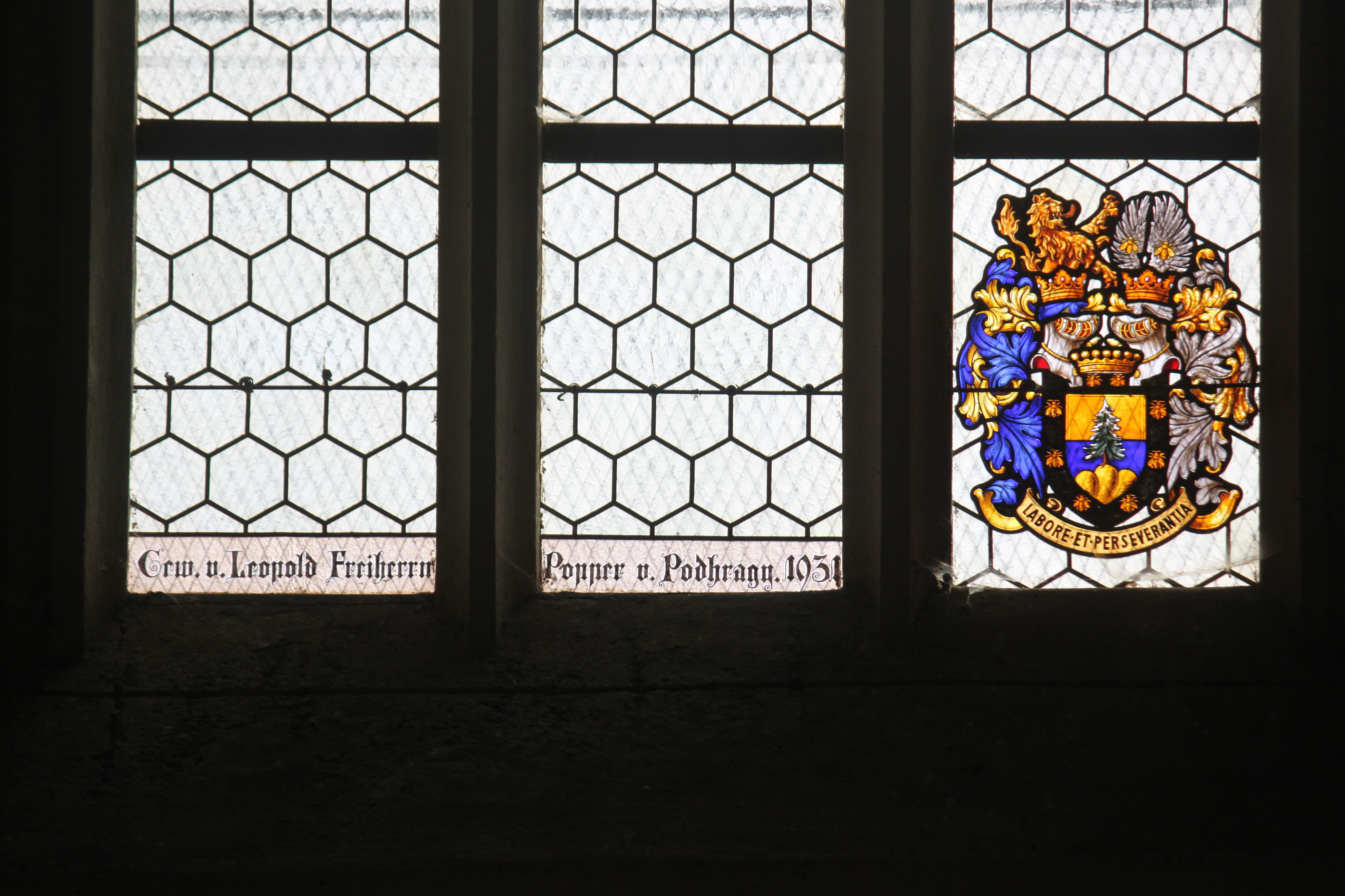 Kath. Filialkirche hl. Wolfgang, Glasfenster, Gew. v. Leopold Freiherrn Popper von Podhragy. 1931